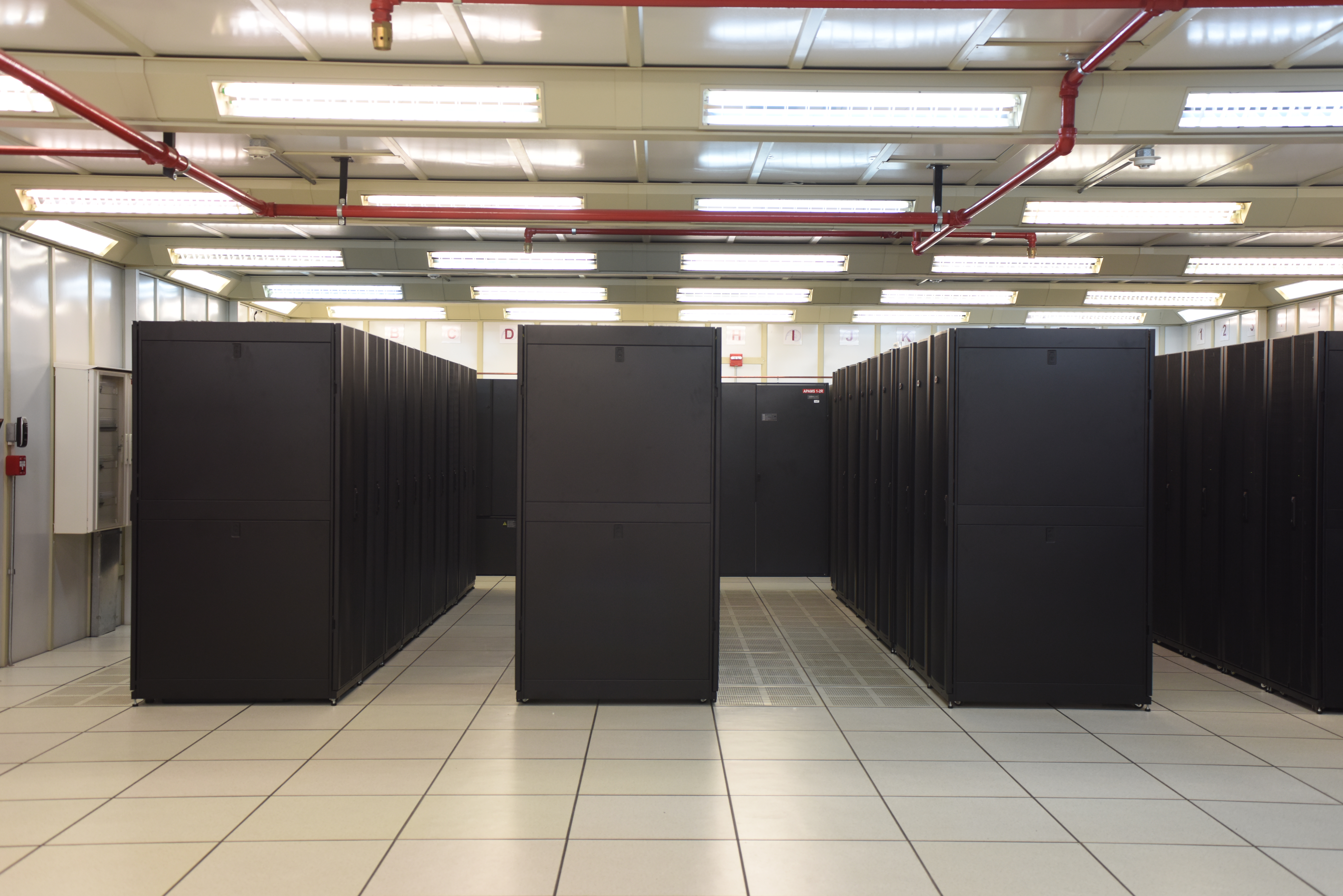 Datacenter de ARSAT